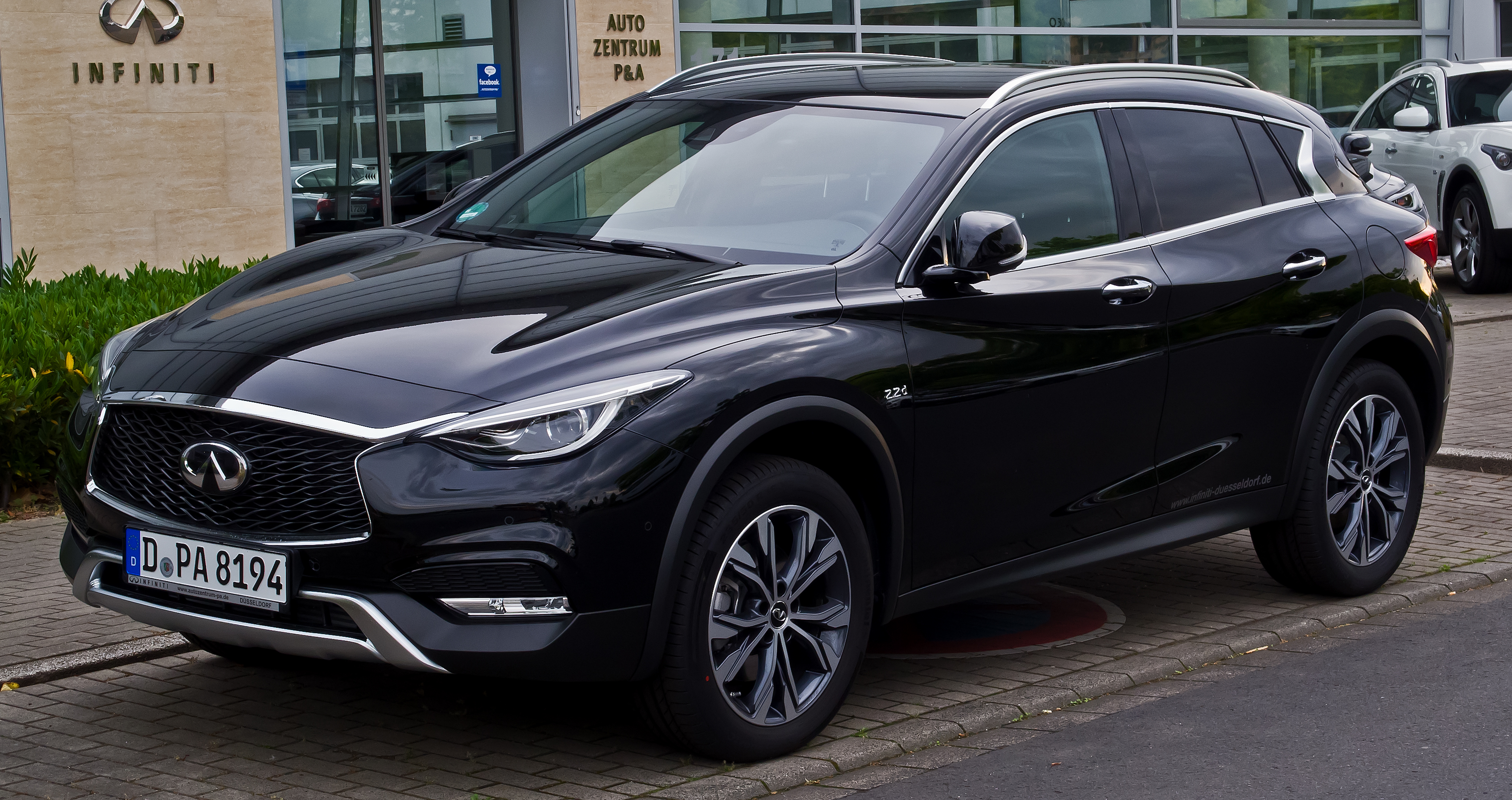 Infiniti QX30 2.2d AWD Premium Tech